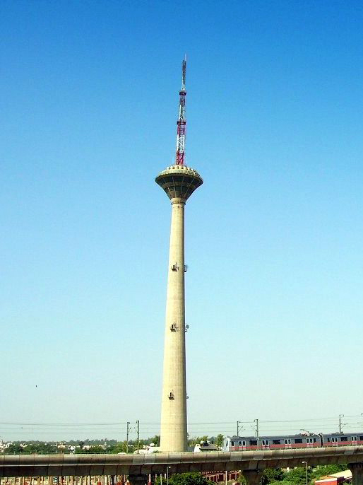 Self made